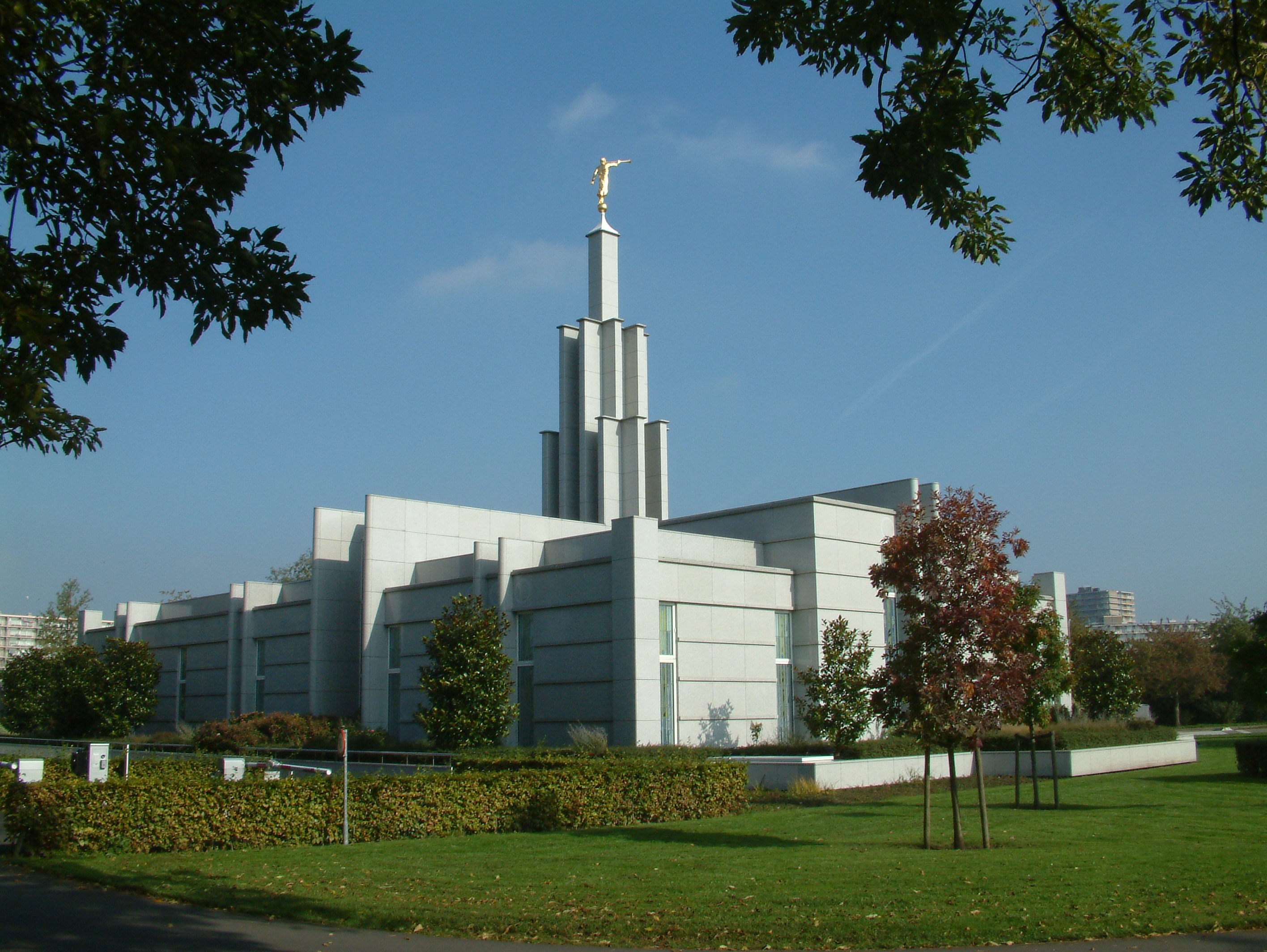 Den Haag Tempel in Zoetermeer